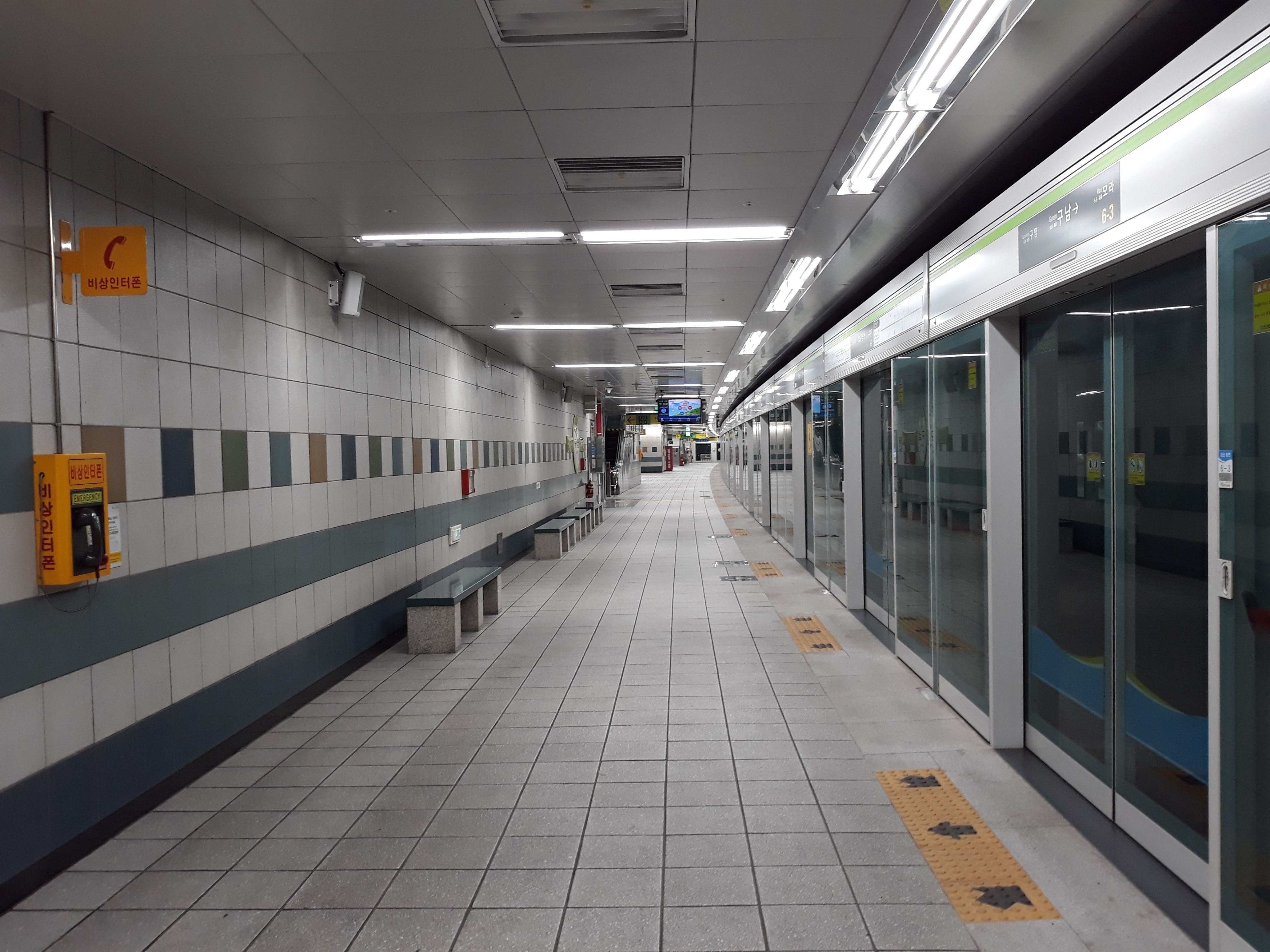 부산 도시철도 2호선 구남역 장산 방면 승강장